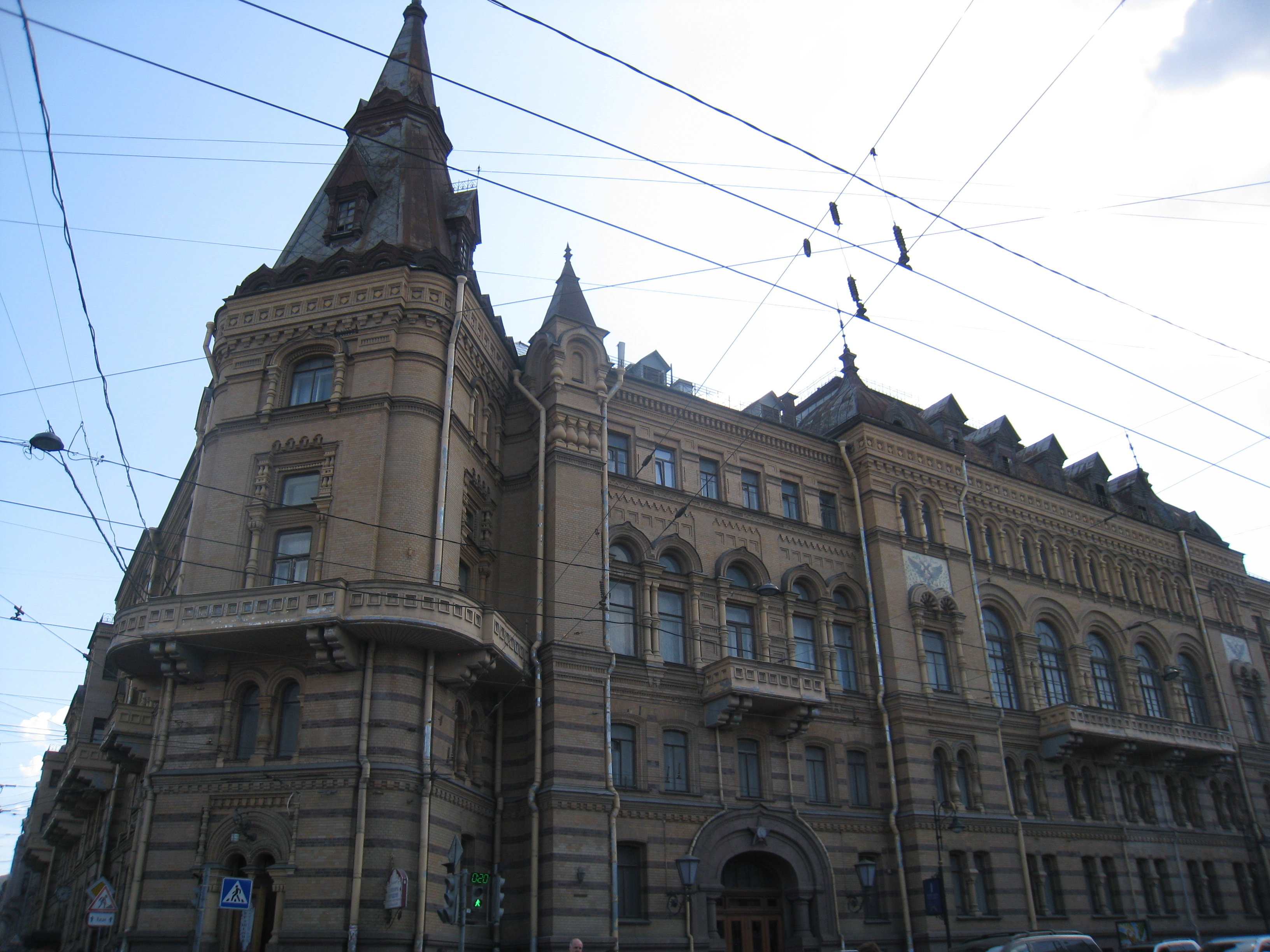 Общее Офицерское собрание Армии и Флота с дворовыми флигелями (Санкт-Петербург и Лен.область, Санкт-Петербург, Литейный проспект, 20, Кирочная улица, 1)